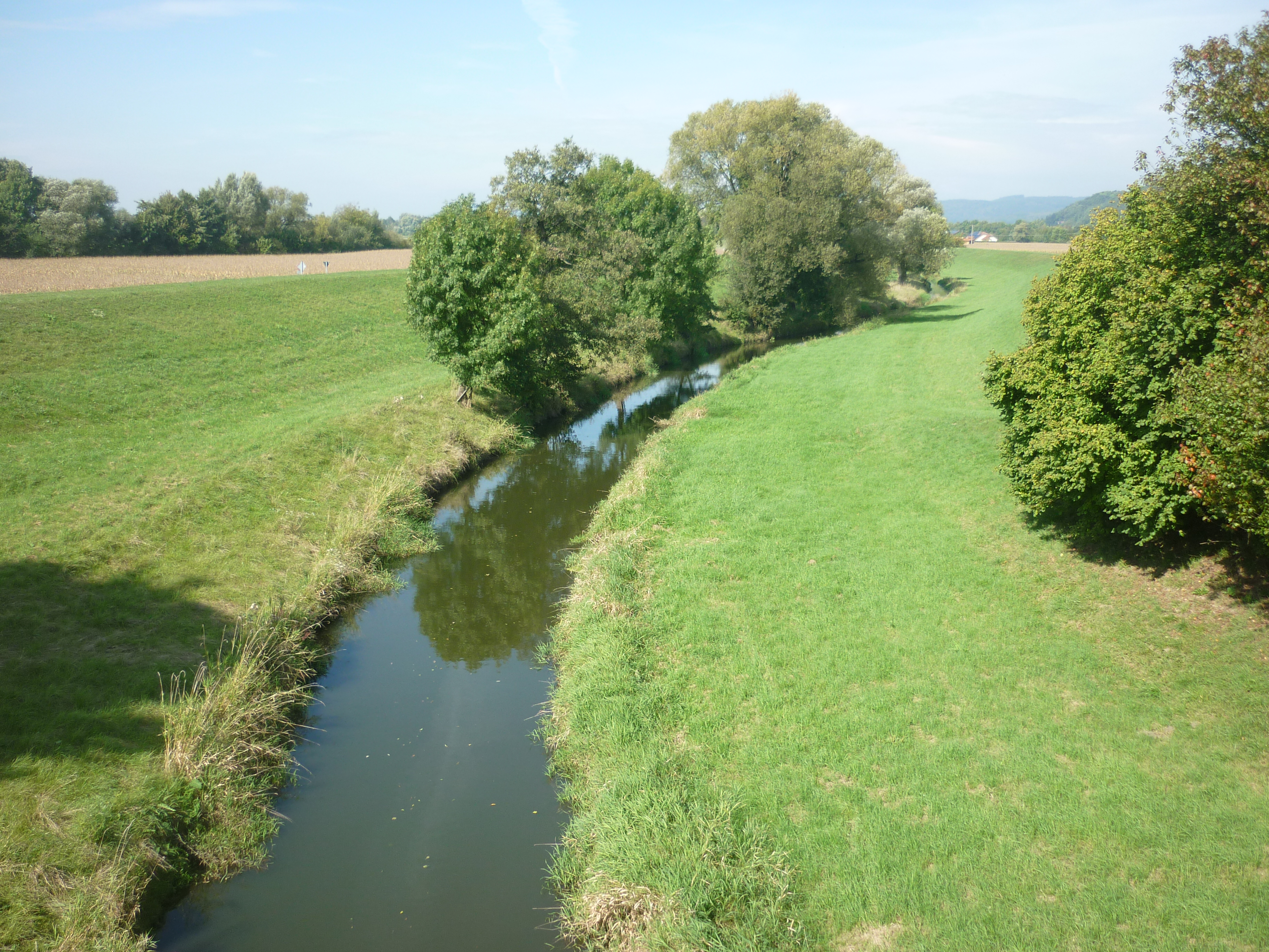 Die Wiesent bei Wörth Donau